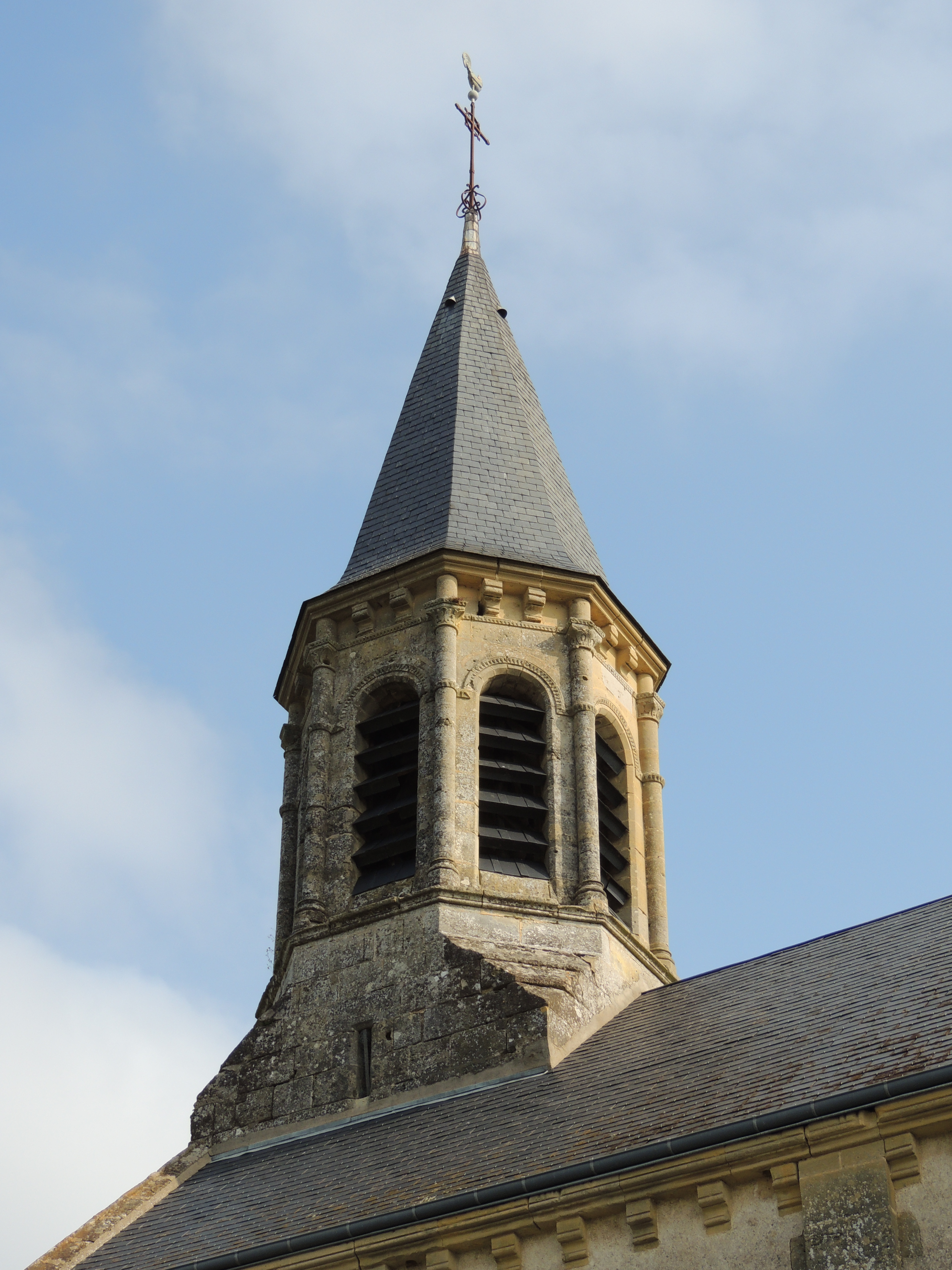 Église Saint-Martin d'Anjouin (Classé) .